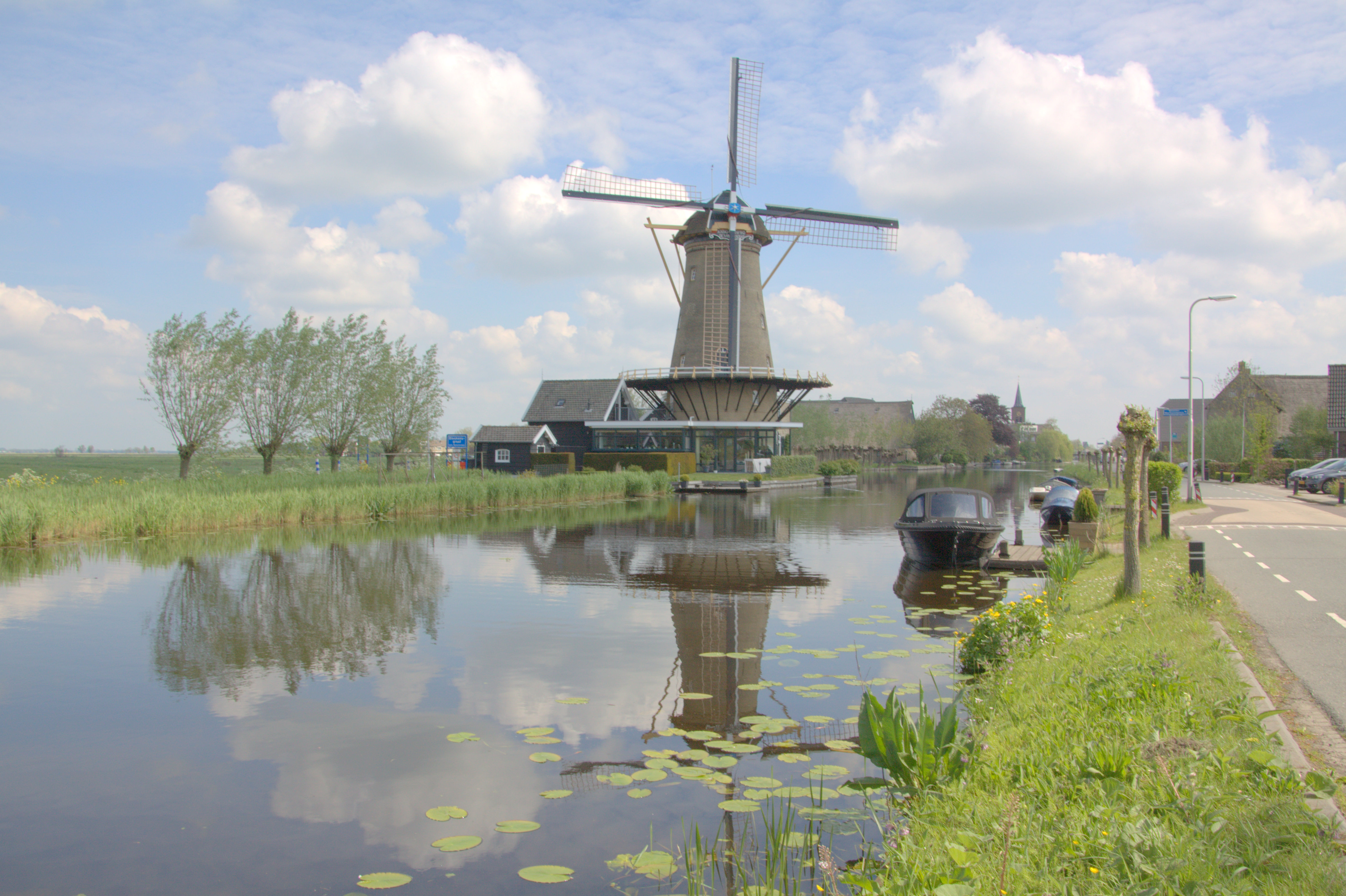 Molen de Vriendschap aan de Graafstroom in Bleskensgraaf in de gemeente Molenlanden en de streek Alblasserwaard.